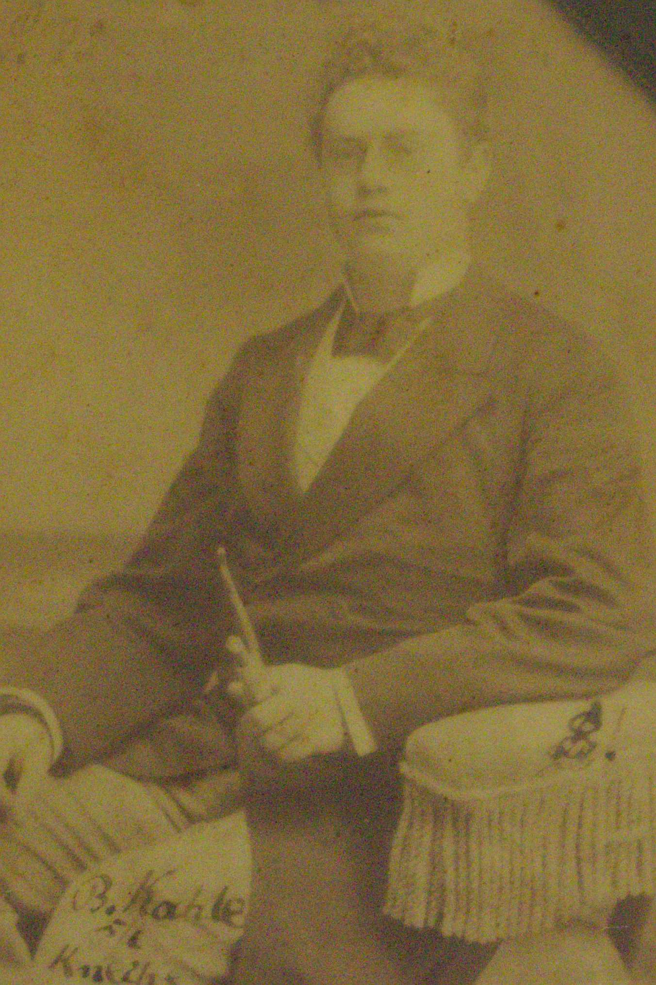 Fotografie von Bernhard Kahle als Mitglied der Studentenverbindung Leonensia. Standort: Ahnengalerie im Conventssaal der Verbindung Leonensia